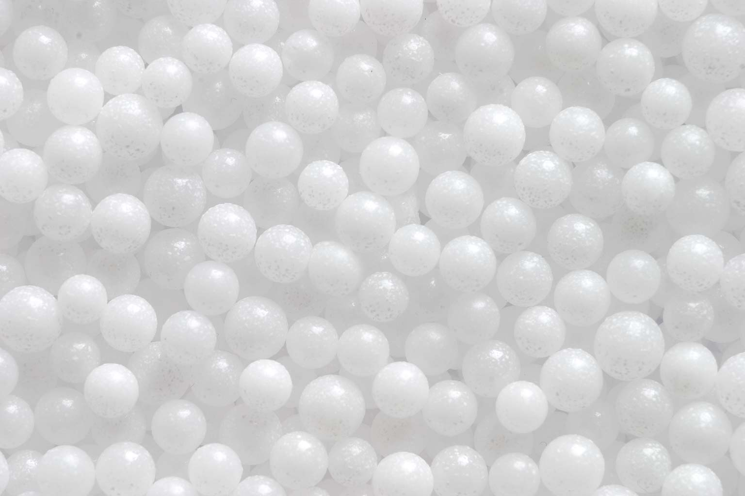 Гранулы полистирола